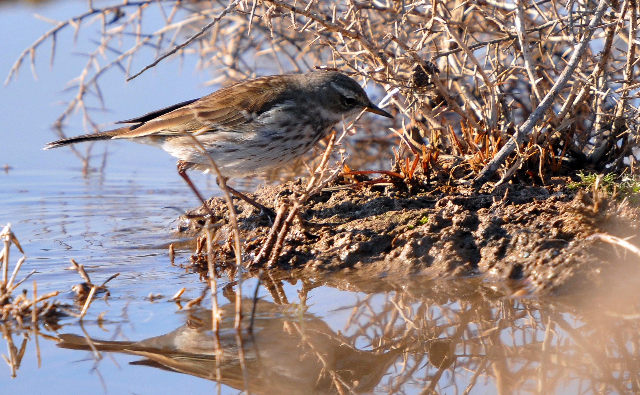 Anthus spinoletta in Bismil, Turkey